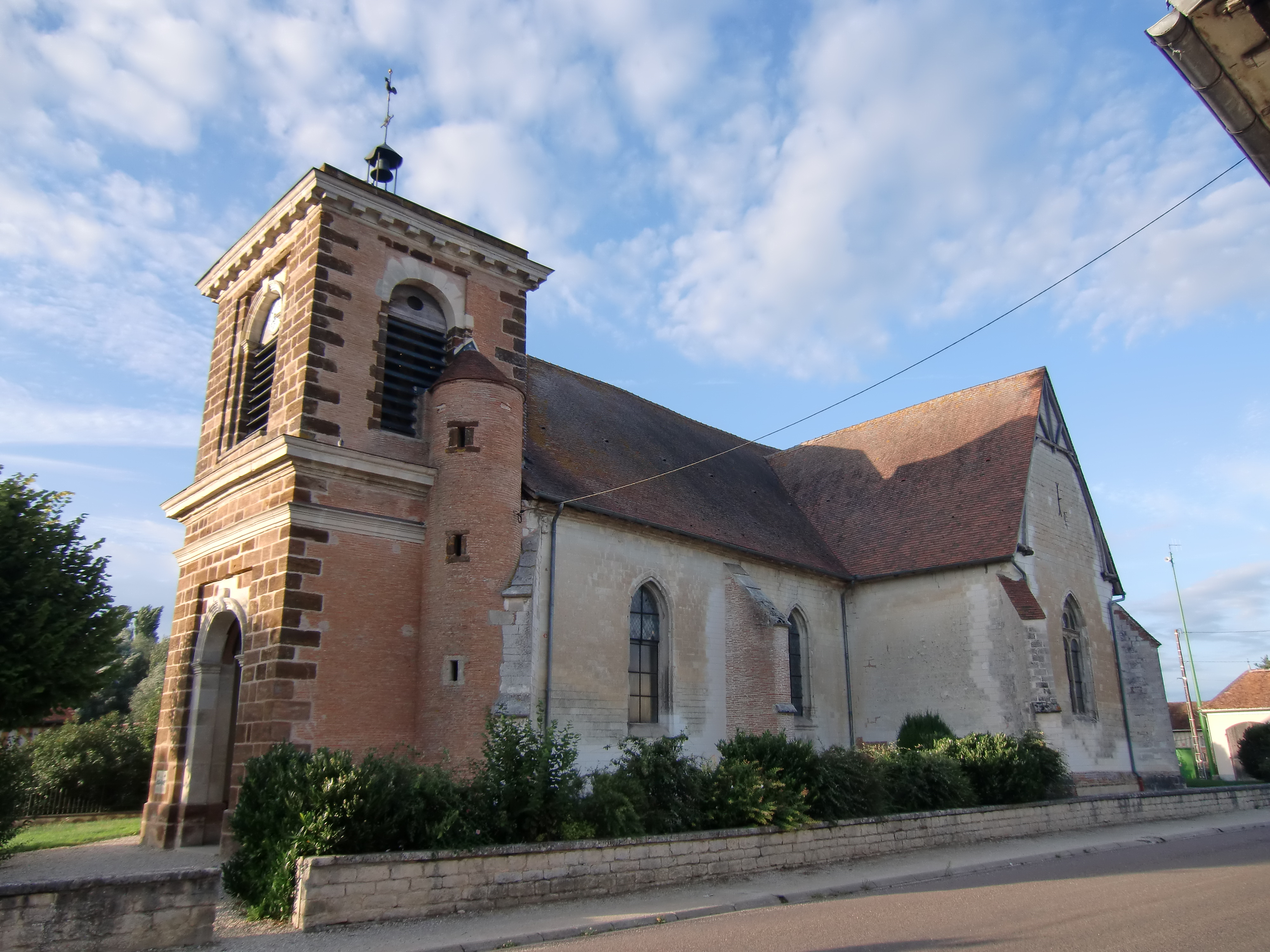 église Saint Clément et Saint Barthélemy de Brévonnes (Aube, Champagne, France)